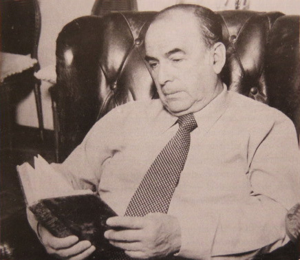 Fernando Moraga Acevedo